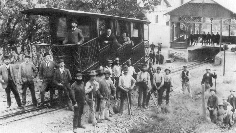 Bildbeschreibung: Standseilbahn auf den Krahnenberg in Andernach (1895-1939) Fotograf/Zeichner: ... unbekannt Datum: ... 1895